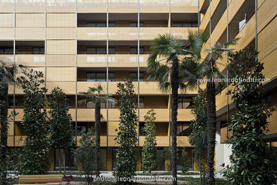 Überbauung Citybay, Luzern, Switzerland